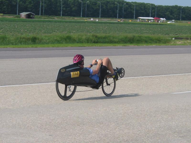 Van met toestemming van eigenaar. Zie bericht